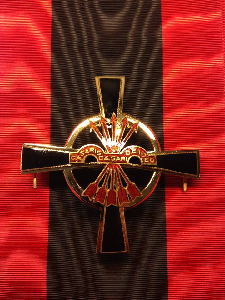 Placa de Gran Cruz y banda de la Orden Imperial del Yugo y las Flechas